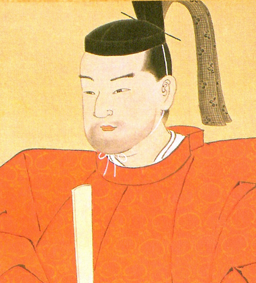 遠山友明の肖像。